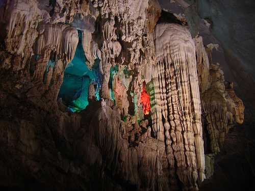 Phong Nha Ke Bang, Quang Binh, Vietnam